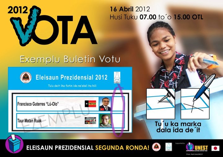 Wählerinformation zu den Präsidentschaftswahlen 2012